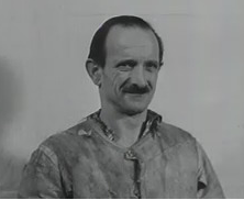 Franz Eirenschmalz (* 20. Oktober 1901 in München; † unbekannt) war ein deutscher Architekt, Bauleiter und SS-Standartenführer. Eirenschmalz wurde in den Nürnberger Prozessen angeklagt und als Kriegsverbrecher verurteilt.